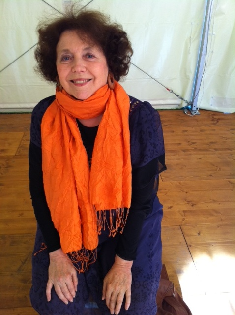 Assise dans une tente en Jordanie.